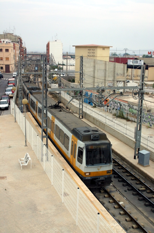 Unidad de Tren Articulada (UTA) 3731 entrando a Empalme ([Burjassot])